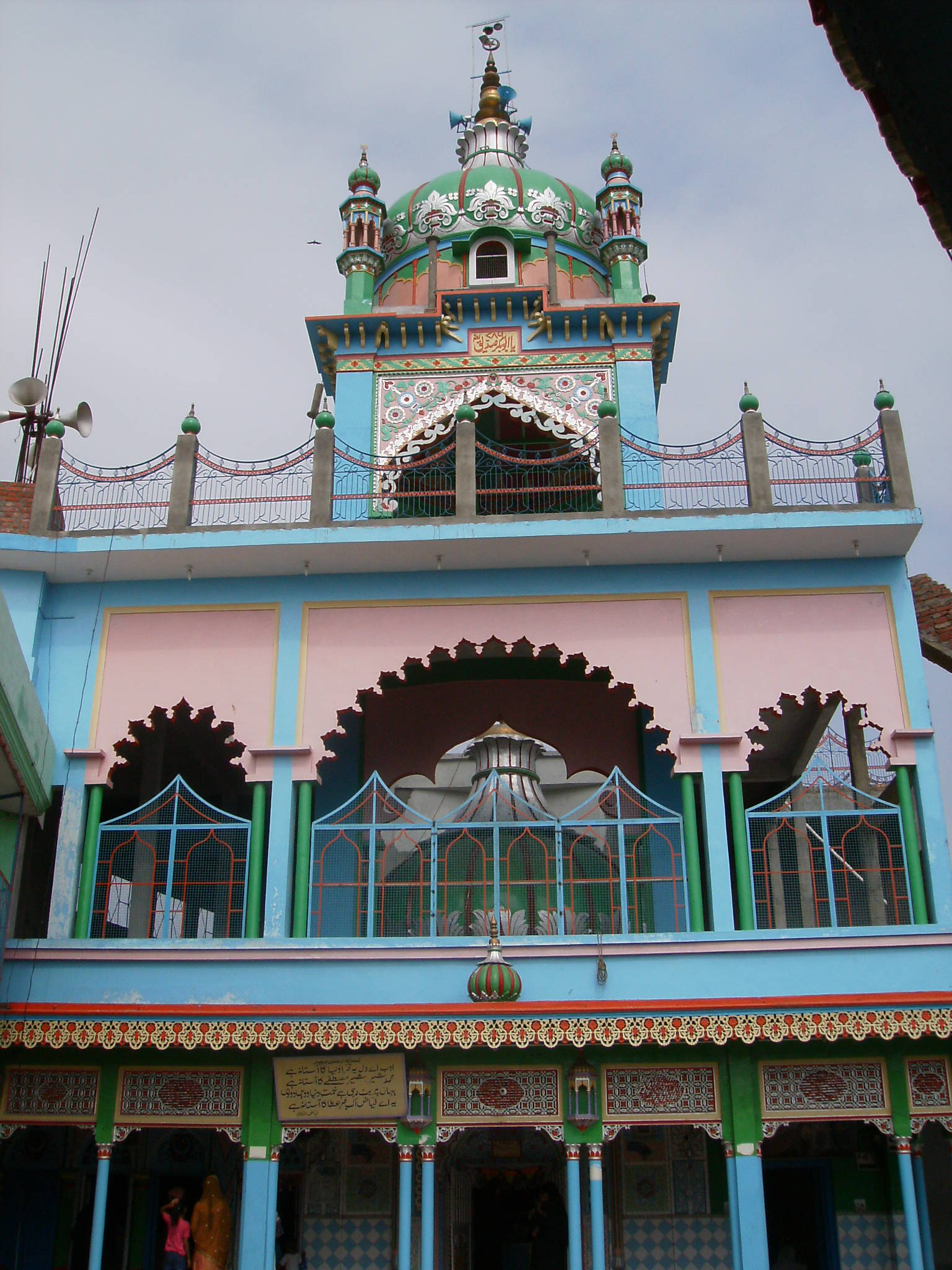 Shaji Mazar, Pilibhit, Utter Pradesh, India.